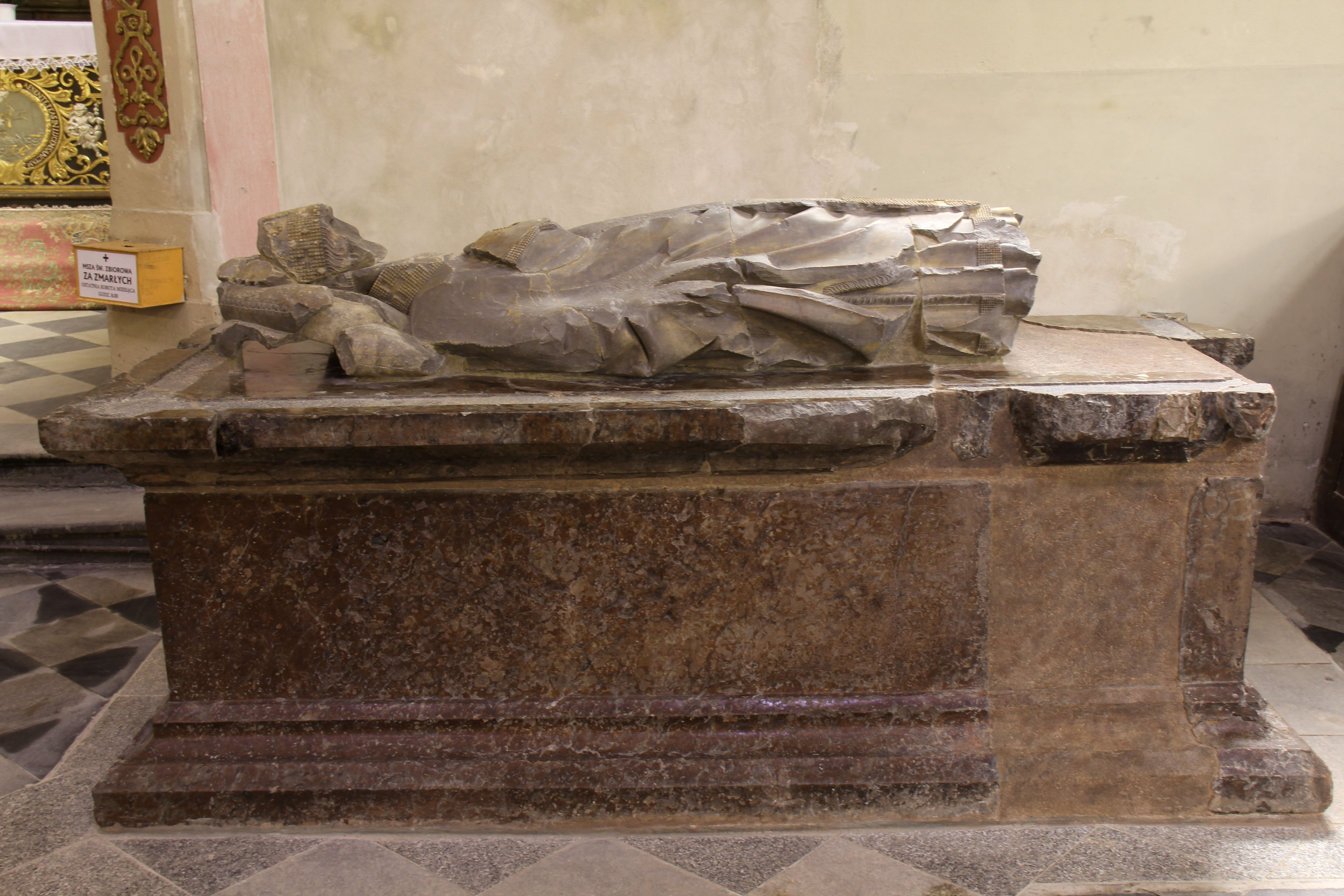 Kladsko, kostel Nanebevzetí Panny Marie, náhroní tumba Arnošta z Pardubic, Parléřova dílna, z roku 1364